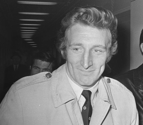 Arrivée de l'équipe de football du Celtic de Glasgow à l'aéroport d'Amsterdam-Schiphol pour le match contre l'Ajax. Photographie des footballeurs britanniques Tommy Gemmell (à gauche) et Willie Wallace par Joost Evers / Anefo.